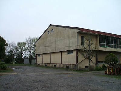 柏市立高田小学校体育館